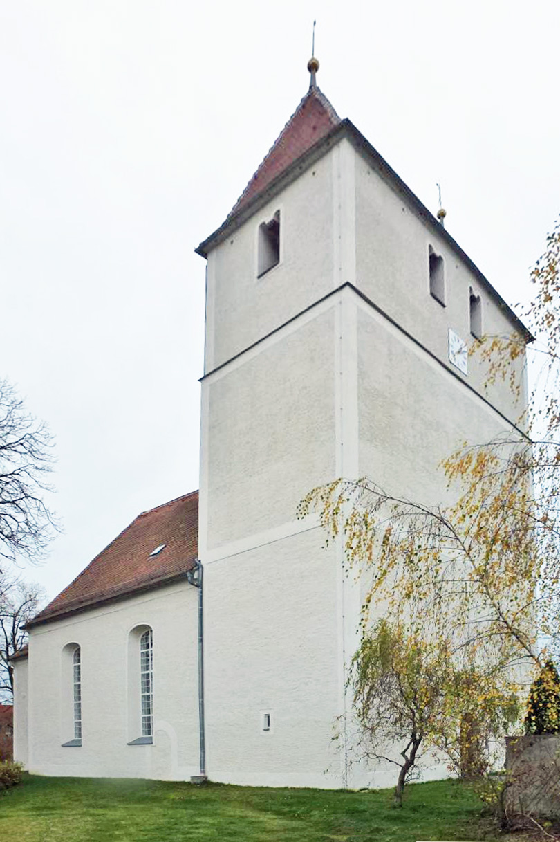 Kirche in Klinga